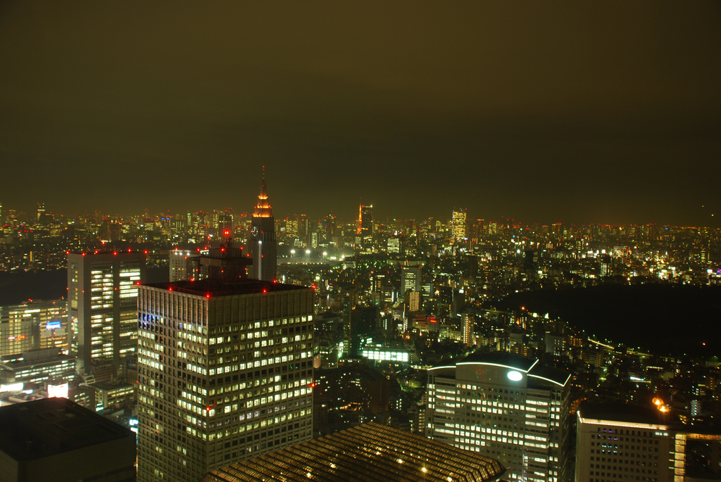 Shinjuku